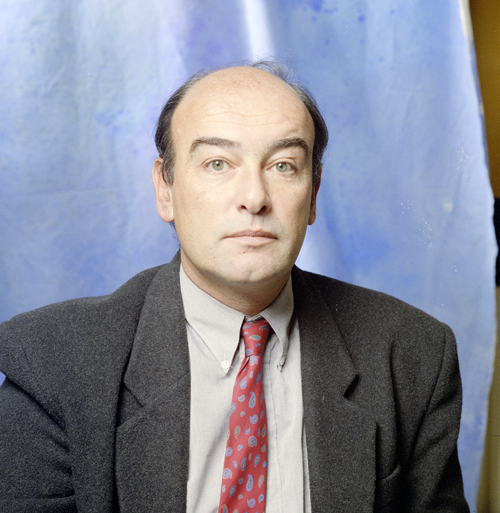 Peter de Bie